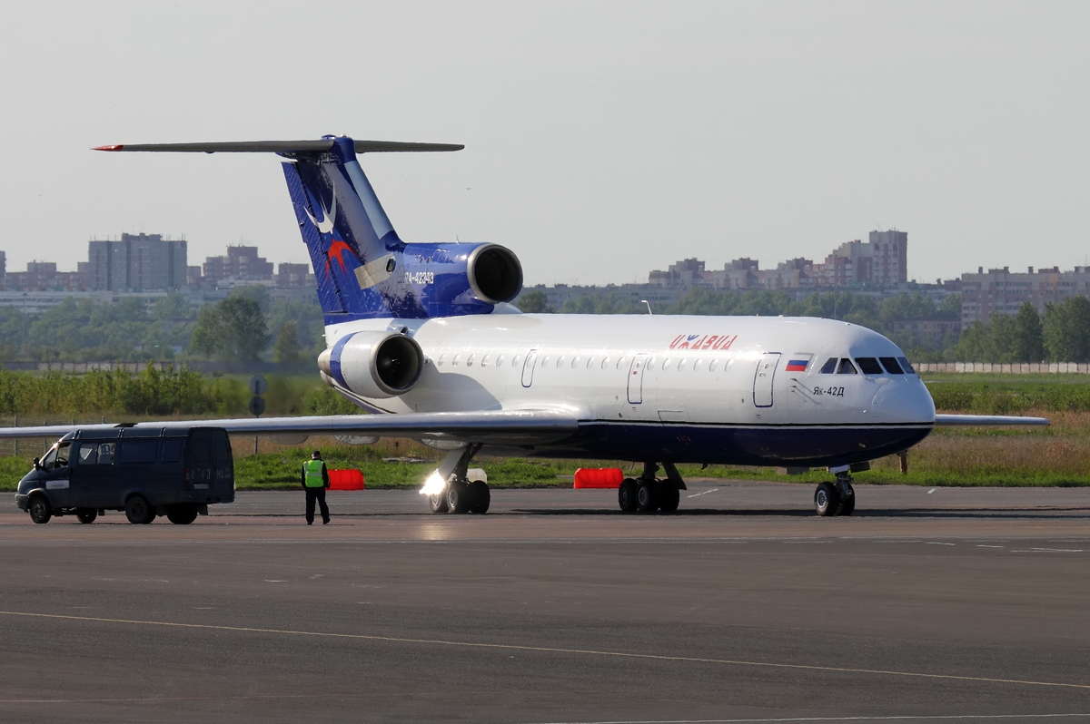 Izhavia Yakovlev Yak-42D